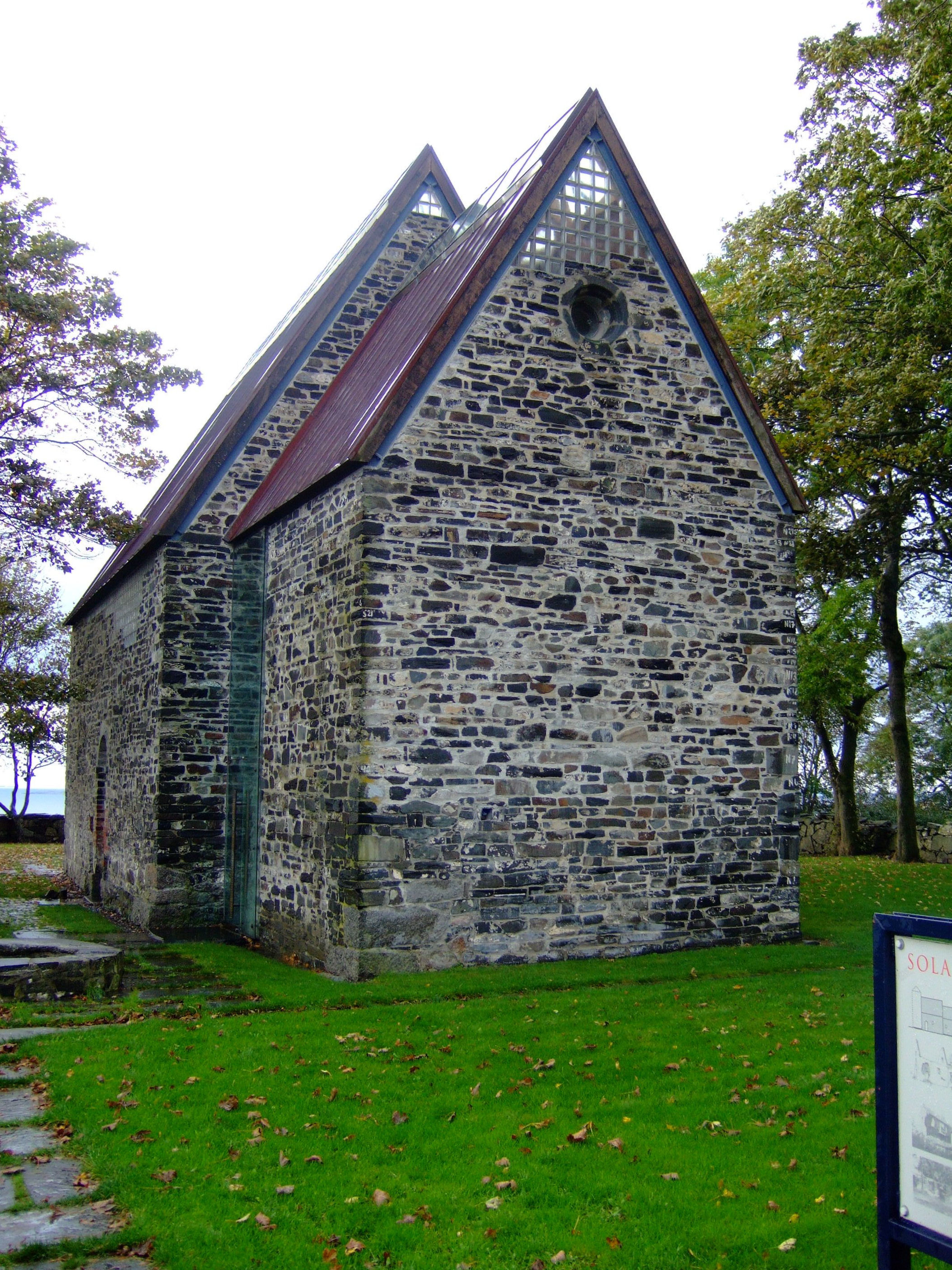 Sola ruin kirke